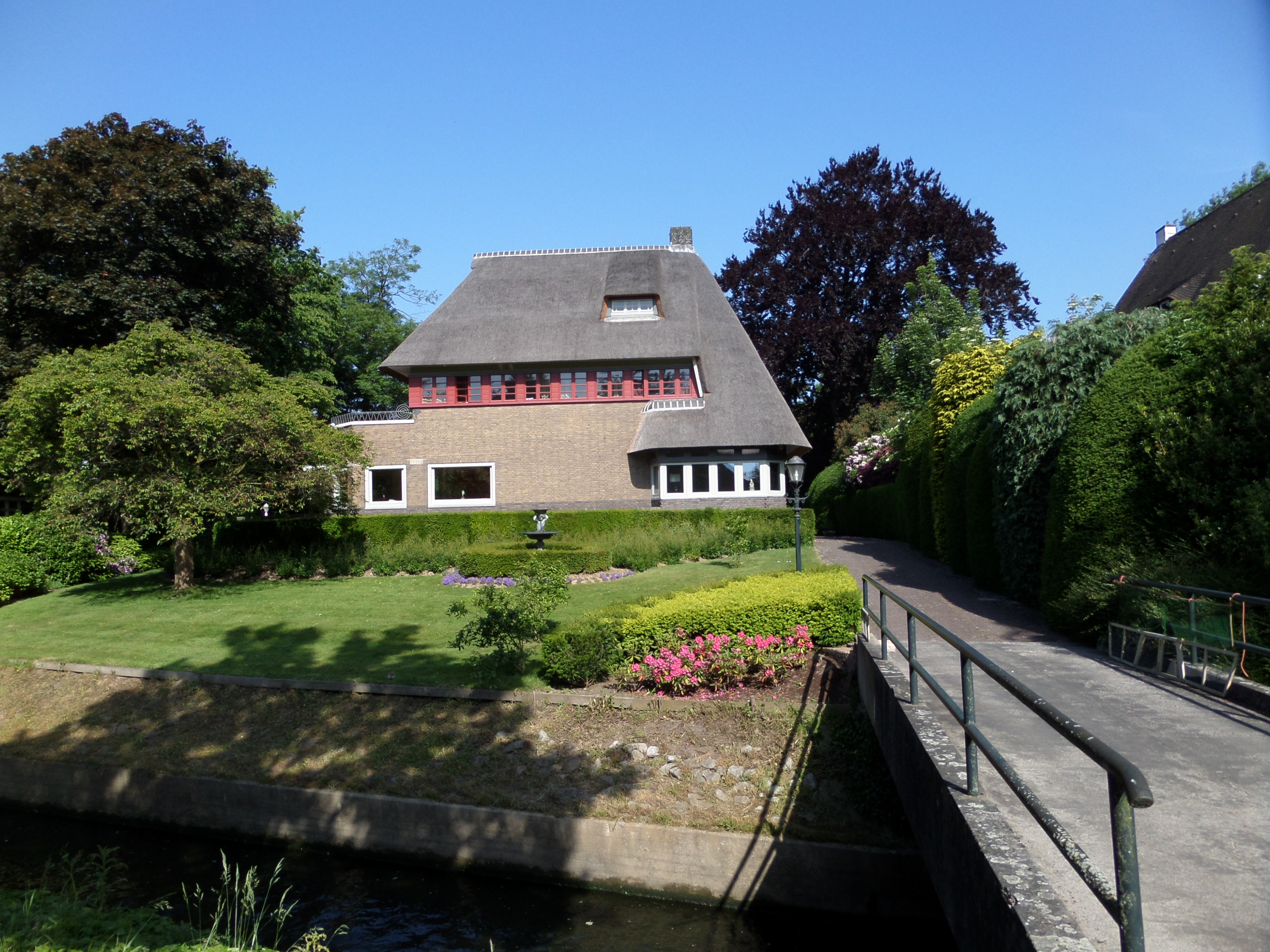 Rijksmonument Parklaan 27 van architect Jos Wielders in Sittard.